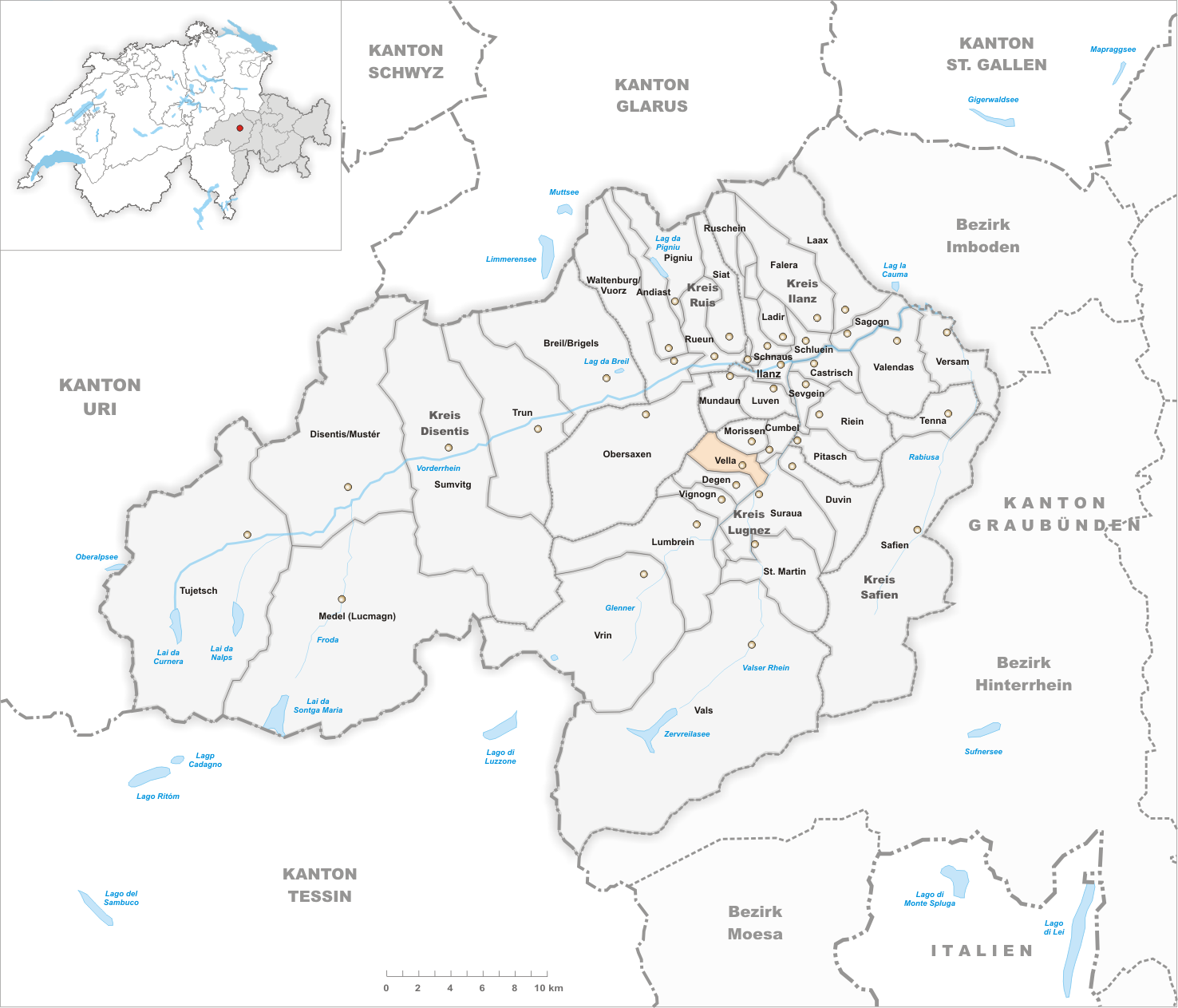 Municipality Vella